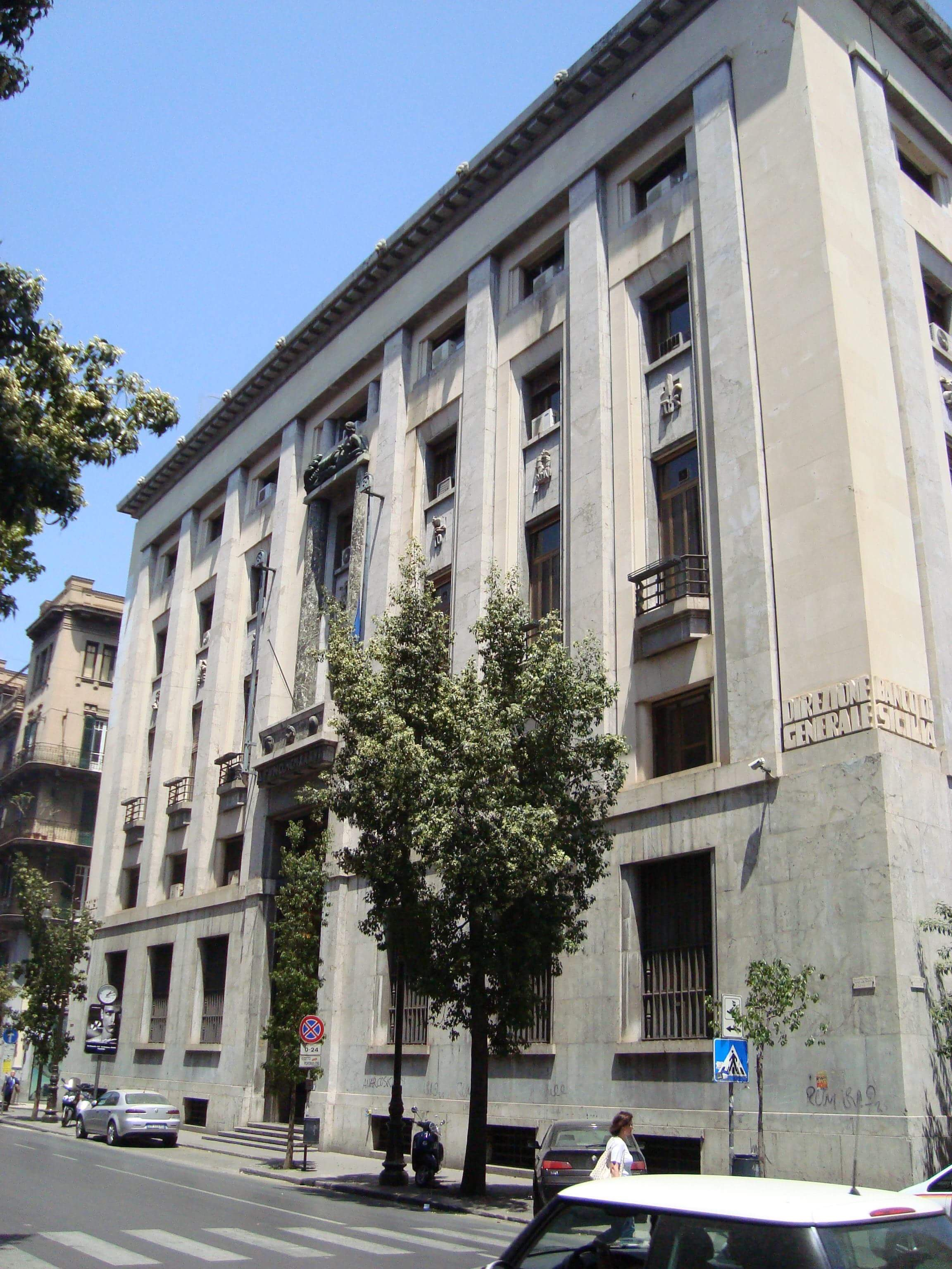 Sede centrale del Banco di Sicilia - Palermo Opera di Salvatore Caronia Roberti - 1936